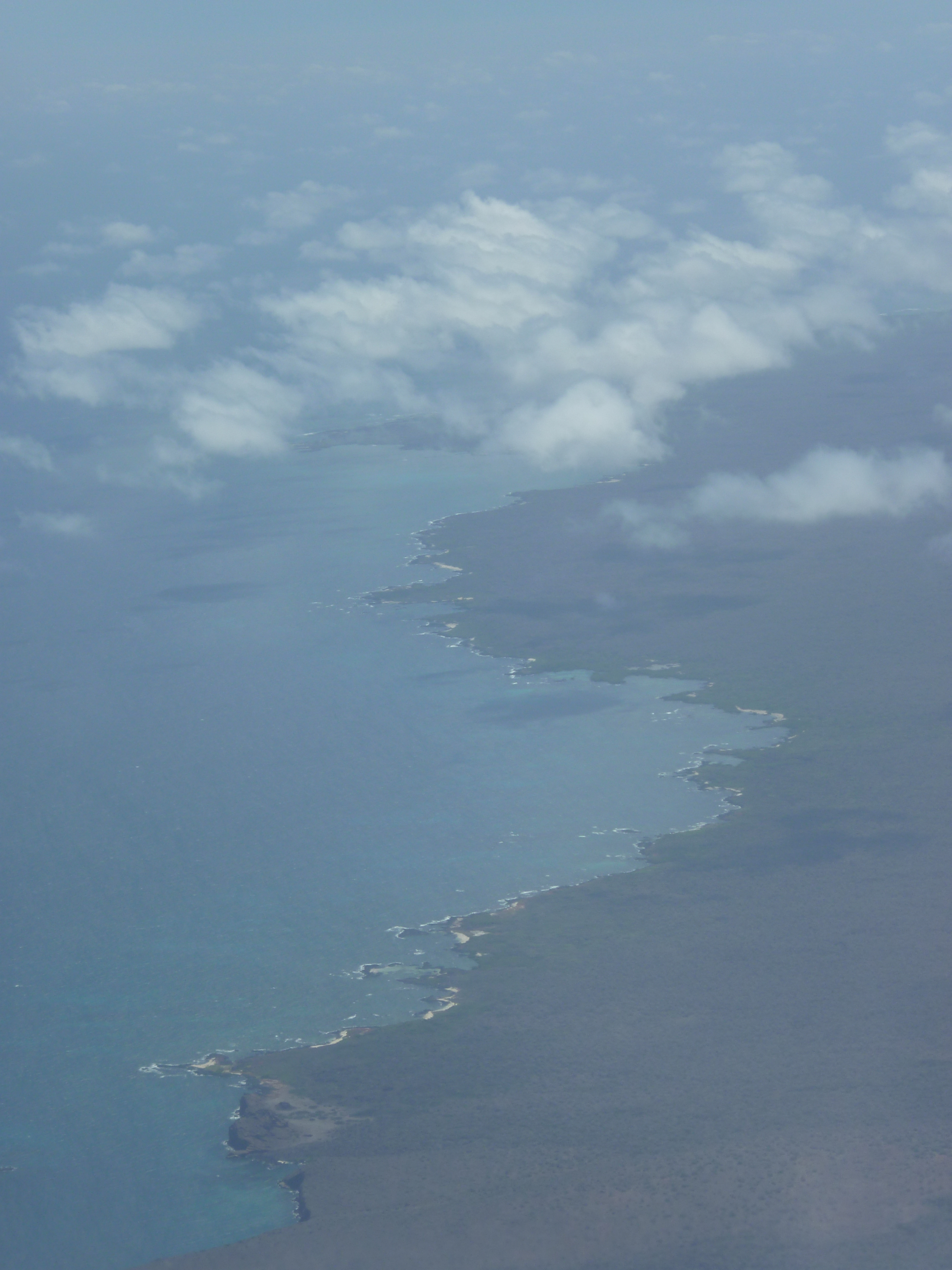 Aerial photograph of the coast of Santa Cruz Island, Galápagos by professional photographer by David Adam Kess